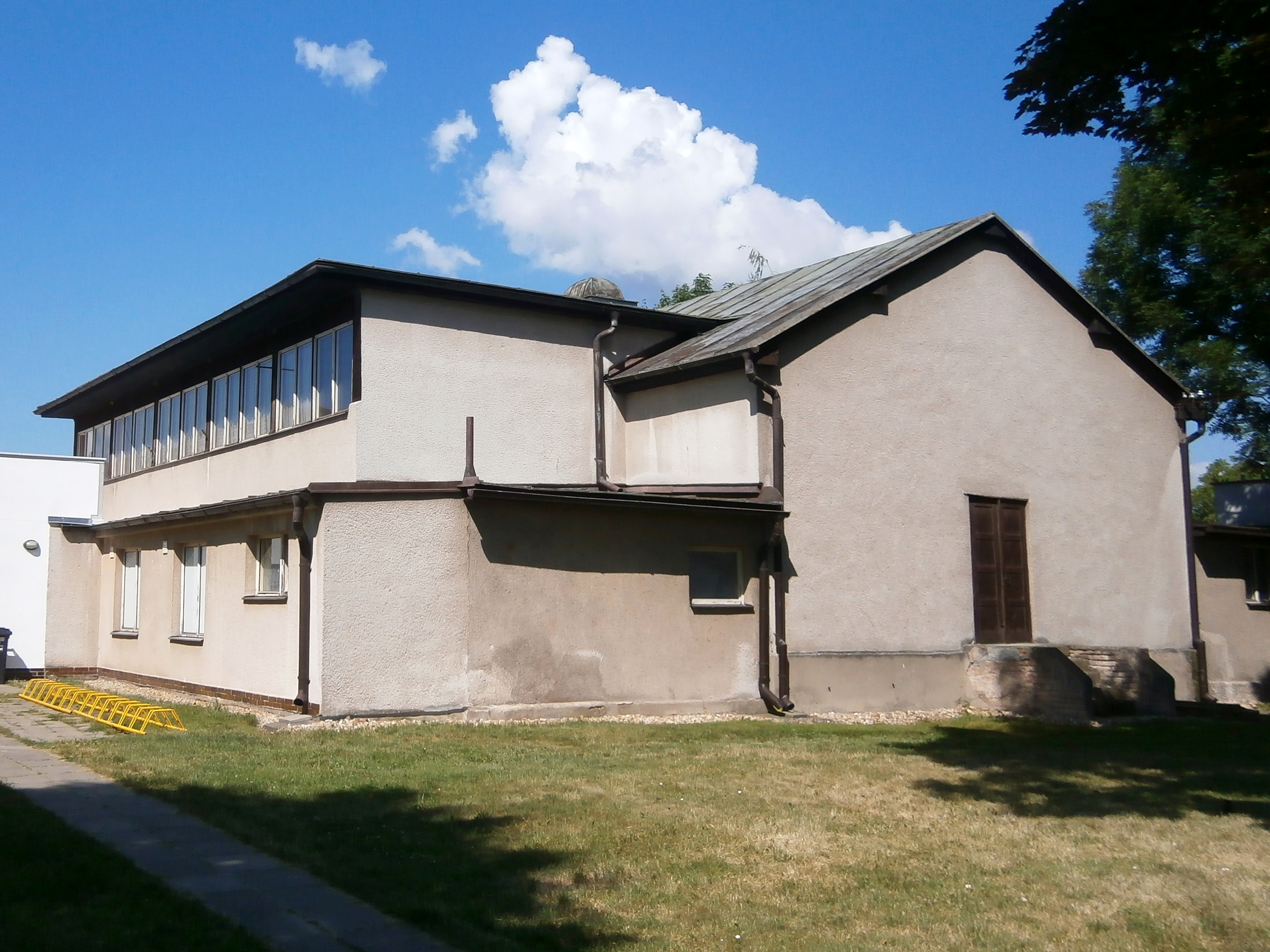 TJ Montas